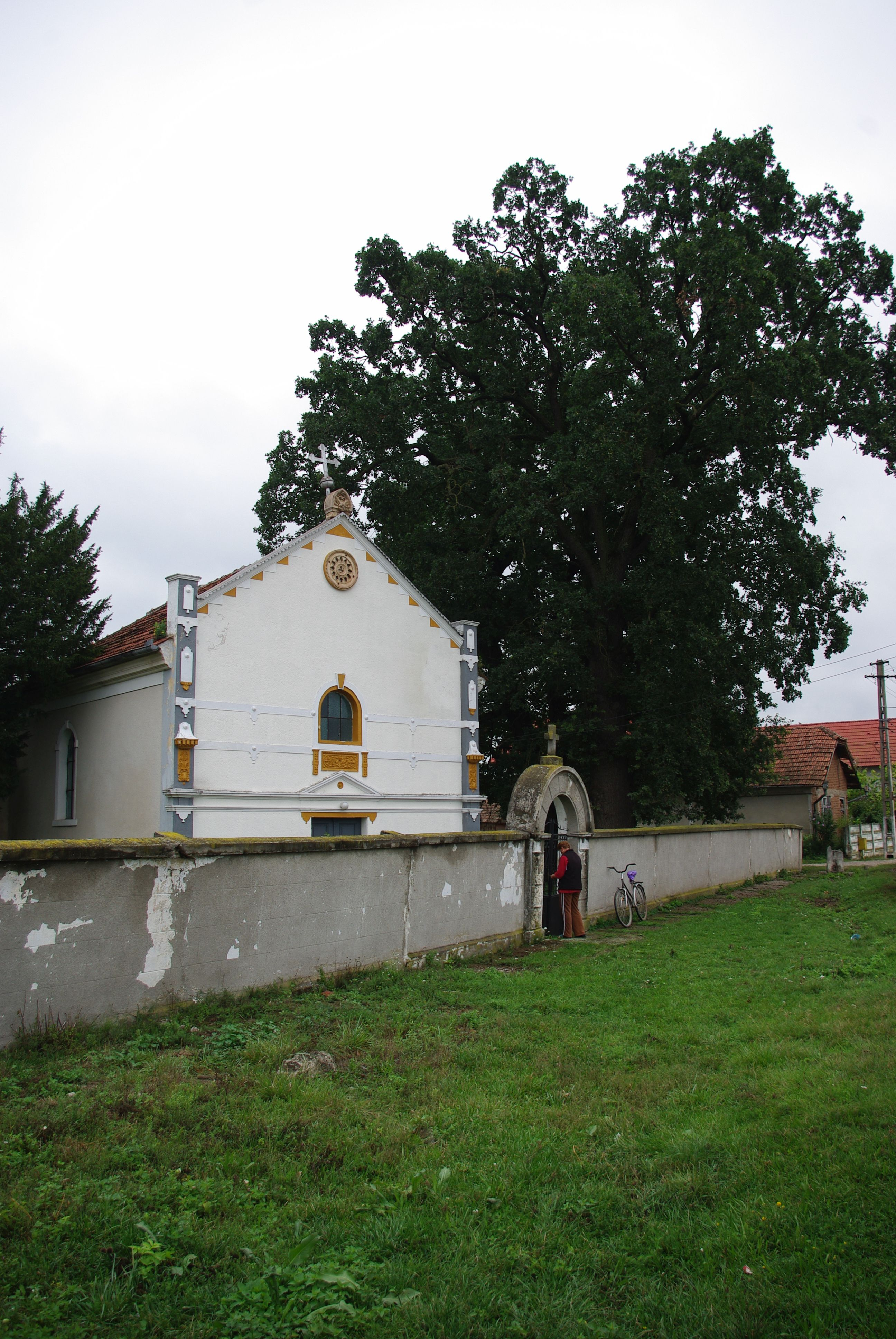 Capelă 03